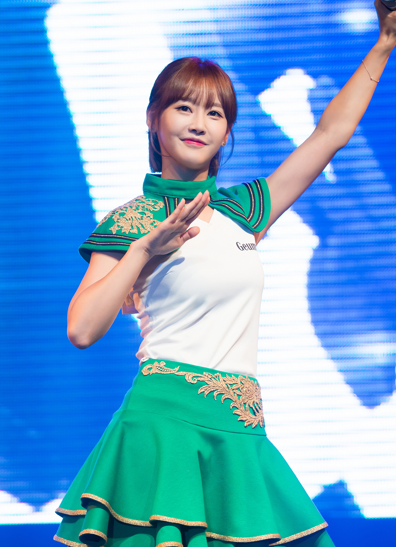 (15.08.22) CRAYON POP 크레용팝 의정부 착한콘서트